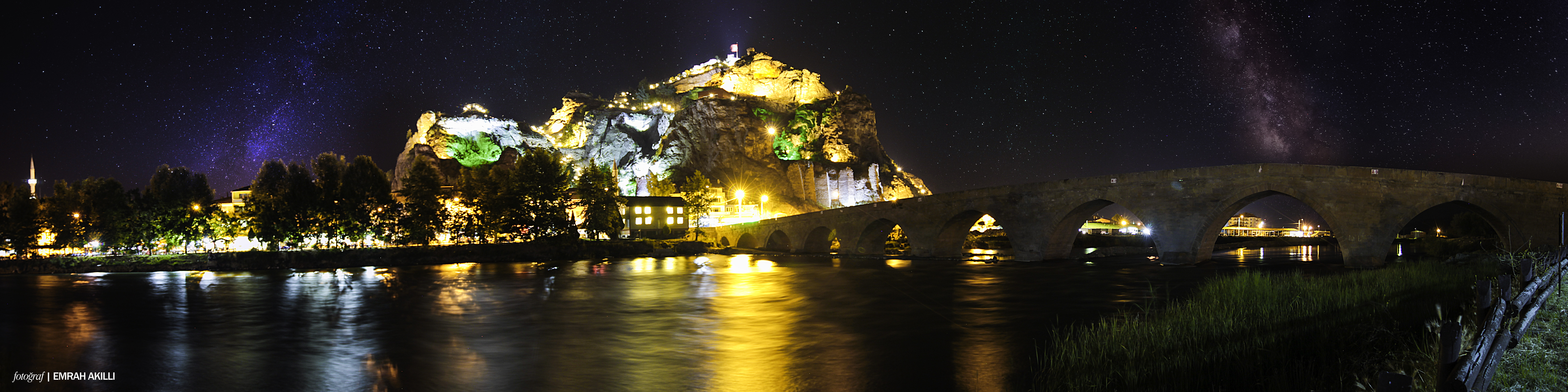 Kızılırmak sahilinden Osmancık Kalesi ve Koyunbaba Köprüsünün gece görünümü.